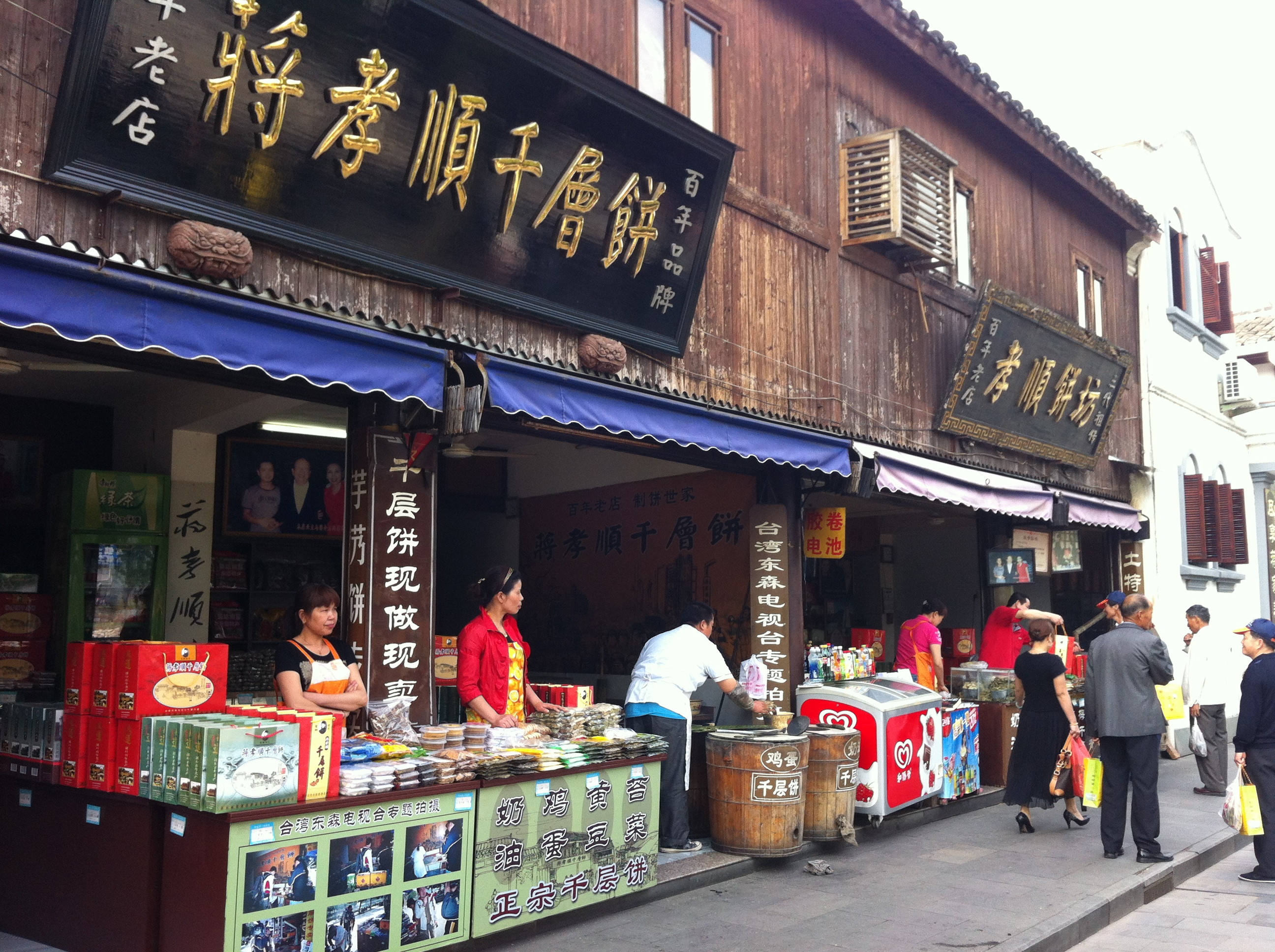 蔣孝順千層餅